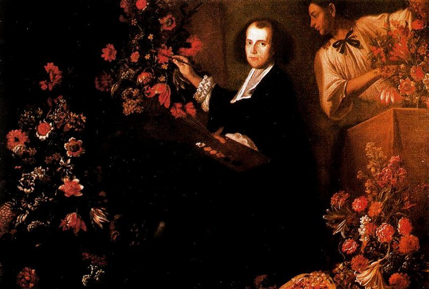 Autorretrato con flores, 1640, óleo sobre lienzo, 136 x 208,5 cm. Florencia, Galería de los Uffizi.